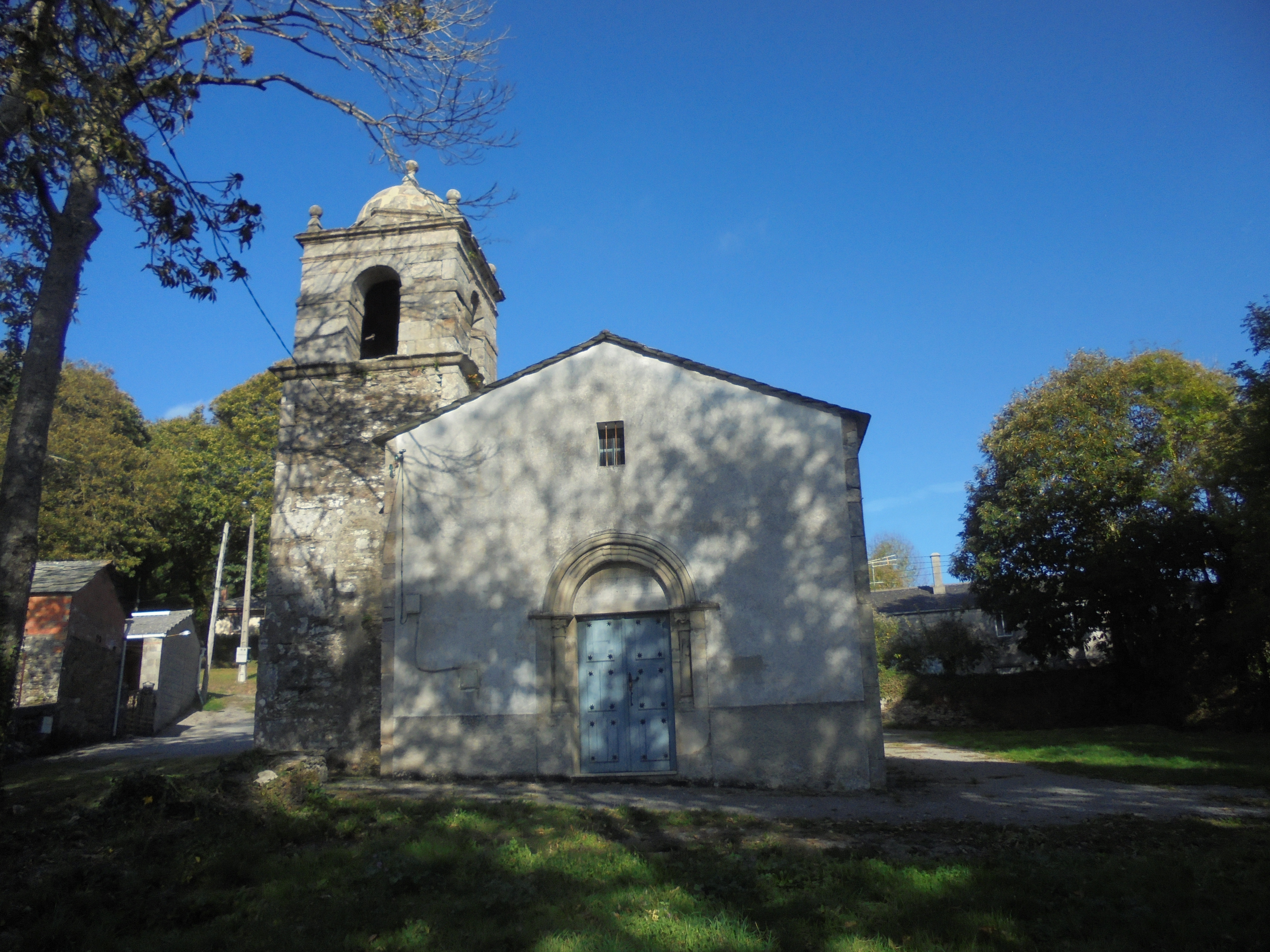 Igrexa parroquial de Valonga ( Pol)